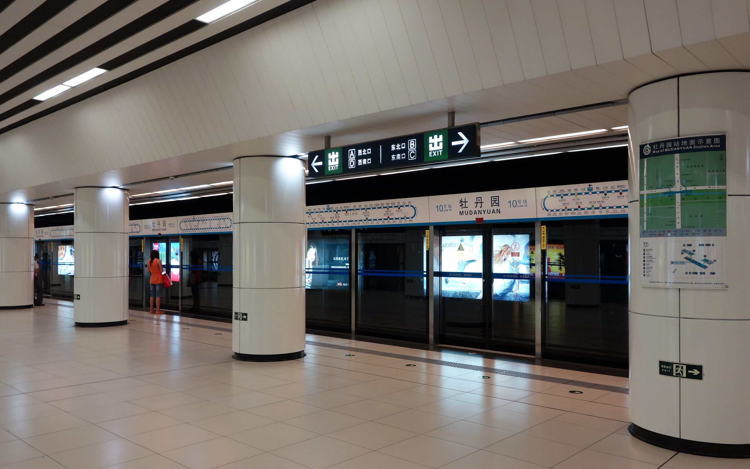 北京地铁10号线牡丹园站